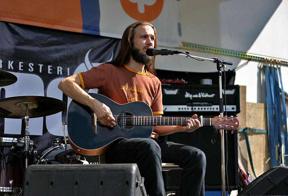 Jarkko Martikainen performing.